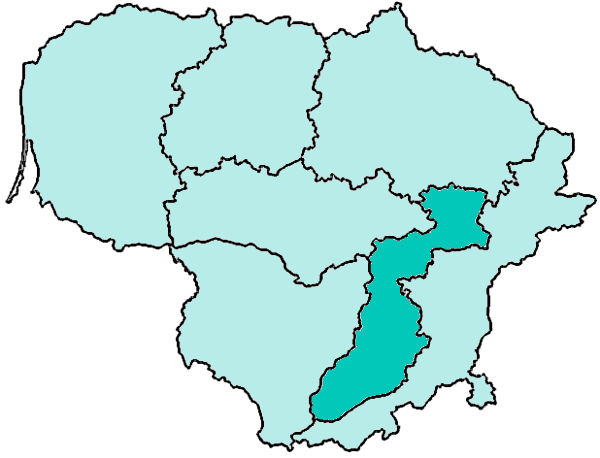 Mappa della diocesi cattolica di Kaišiadorys, in Lituania.